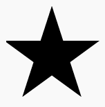 Estrella negra, logotipo de las Anarcopedias Example for class 01.01.03 of Image classification system.